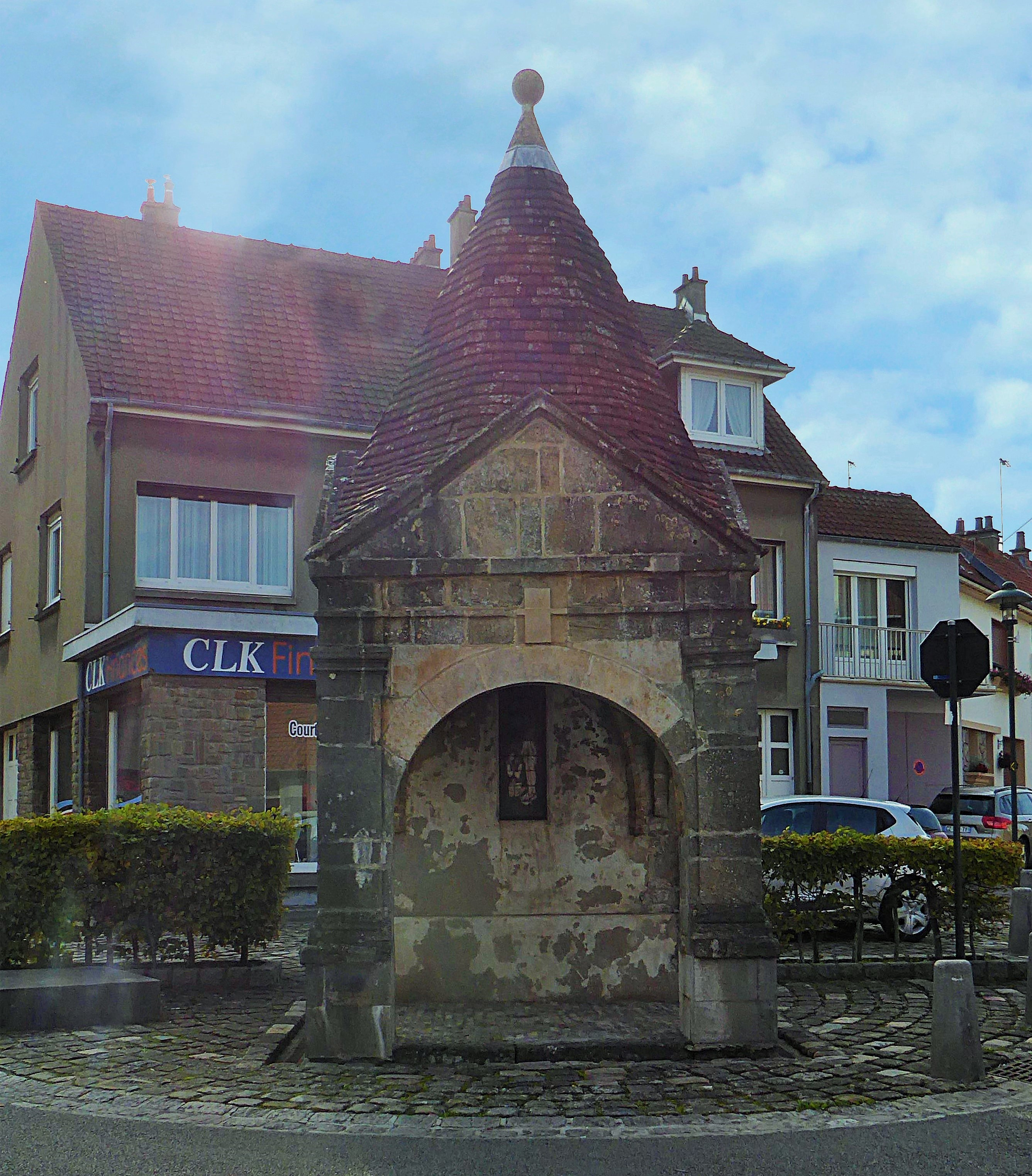 Wimille L'ancienne fontaine .